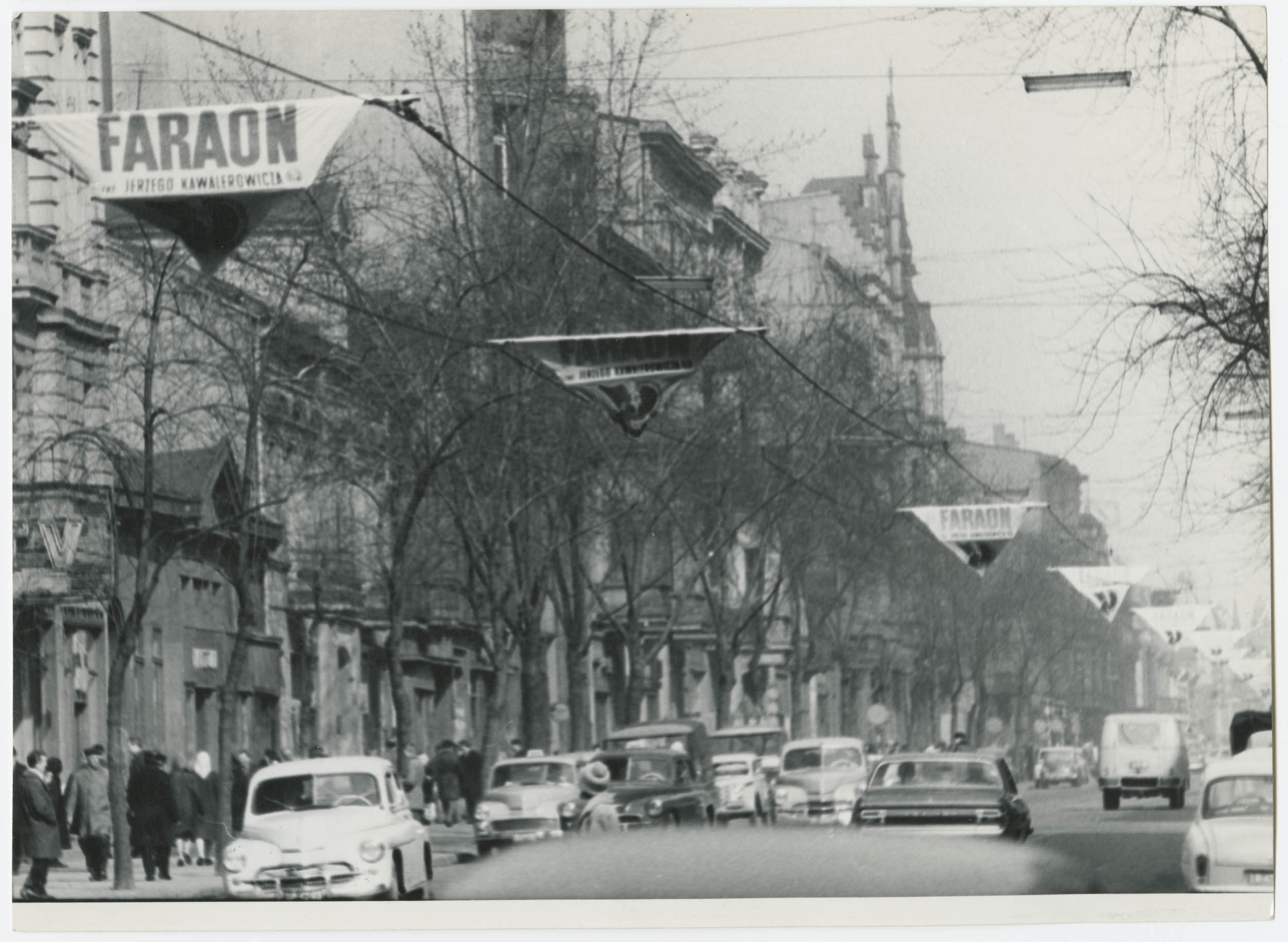 Fotografia przedstawia widok ulicy Piotrkowskiej w kierunku północnym od ulicy Zamenhofa. W pierzei po lewej stronie wyróżnia się trzypiętrowa kamienica, wystawiona około 1898 roku przez Szymona Goldbluma, według projektu Gustawa Landau-Gutentegera. Charakteryzuje się efektowną elewacją, ozdobioną z użyciem swobodnie potraktowanych motywów neogotyckich. Przez lata mieściła się tutaj PALMA - akademicka przychodnia lekarska. Nad ulicą widoczne są plakaty reklamujące film "Faraon", który wszedł na ekrany kin w marcu 1966 roku.